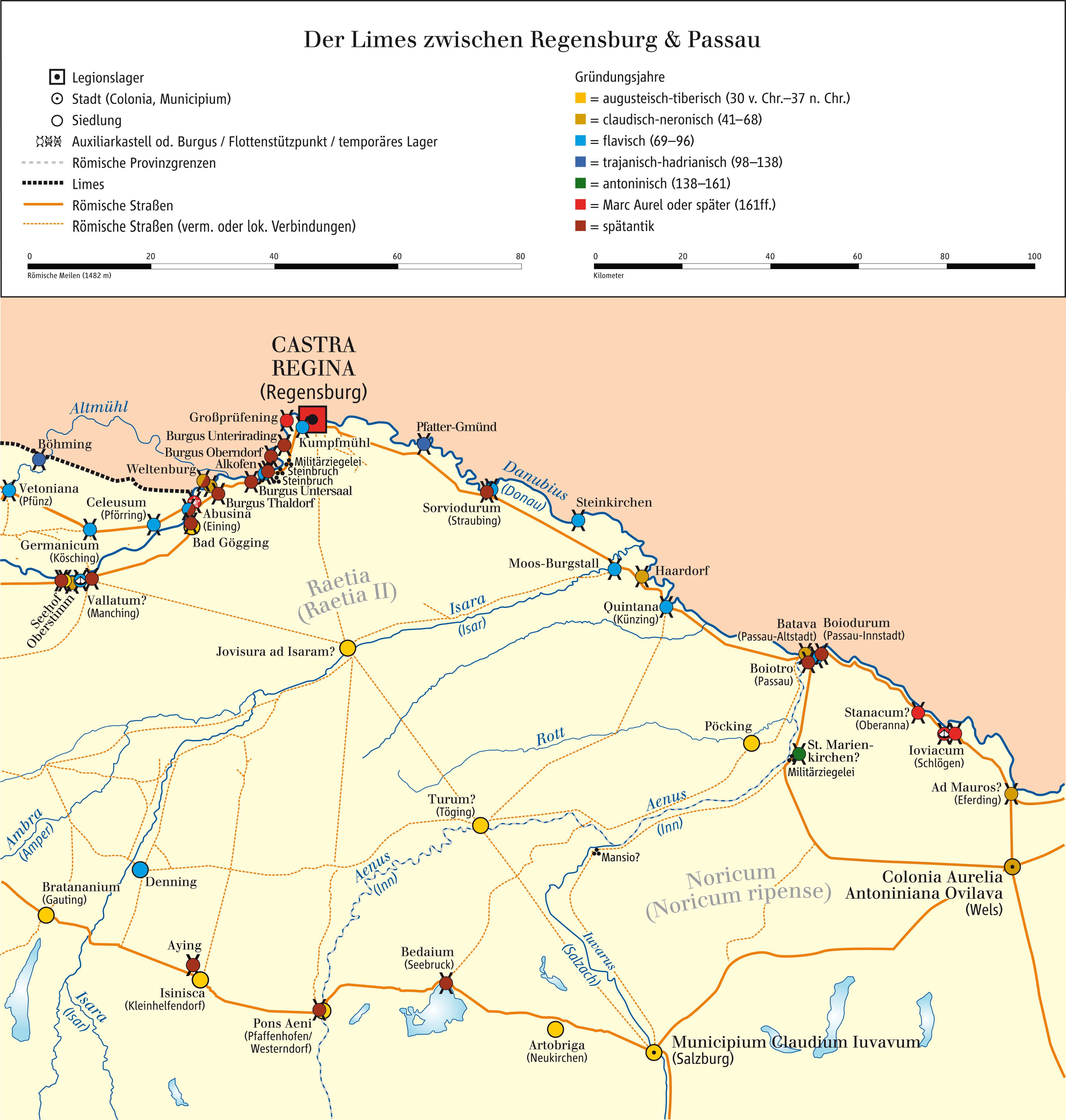 Putzger – Historischer Weltatlas, 89. Auflage, 1965; Westermanns Großer Atlas zur Weltgeschichte, 1978; Martin Kemkes: „Römer an Donau und Iller. Neue Forschungen und Funde.“ Thorbecke, Sigmaringen 1996, ISBN 3-7995-0410-9, S. 152f.; Dietwulf Baatz: Der Römische Limes. Archäologische Ausflüge zwischen Rhein und Donau. 4. Auflage. Gebr. Mann, Berlin 2000, ISBN 3-7861-2347-0; Thomas Fischer und Günther Ulbert: Der Limes in Bayern. Von Dinkelsbühl bis Eining. Theiss, Stuttgart 1983 ISBN 3-8062-0351-2; Wolfgang Czysz u.a.: Die Römer in Bayern. Lizenzausgabe. Nikol, Hamburg 2005, ISBN 3-937872-11-6; Dieter Planck u.a.: Imperium Romanum. Roms Provinzen an Neckar, Rhein und Donau. Theiss, Stuttgart 2005. ISBN 978-3-8062-2140-4; Thomas Fischer, Erika Riedmeier-Fischer: Der römische Limes in Bayern. Pustet, Regensburg 2008. ISBN 978-3-7917-2120-0; Daten des bayerischen Landesdenkmalamtes und des österreichischen Bundesdenkmalamtes